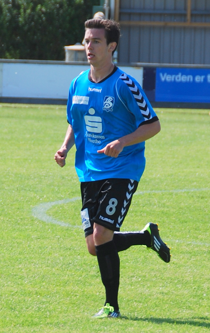 Fodboldspilleren Conor O'Brien fra Blokhus FC. Her i 2. divisionskampen mod Varde IF på Jetsmark Stadion i Pandrup.